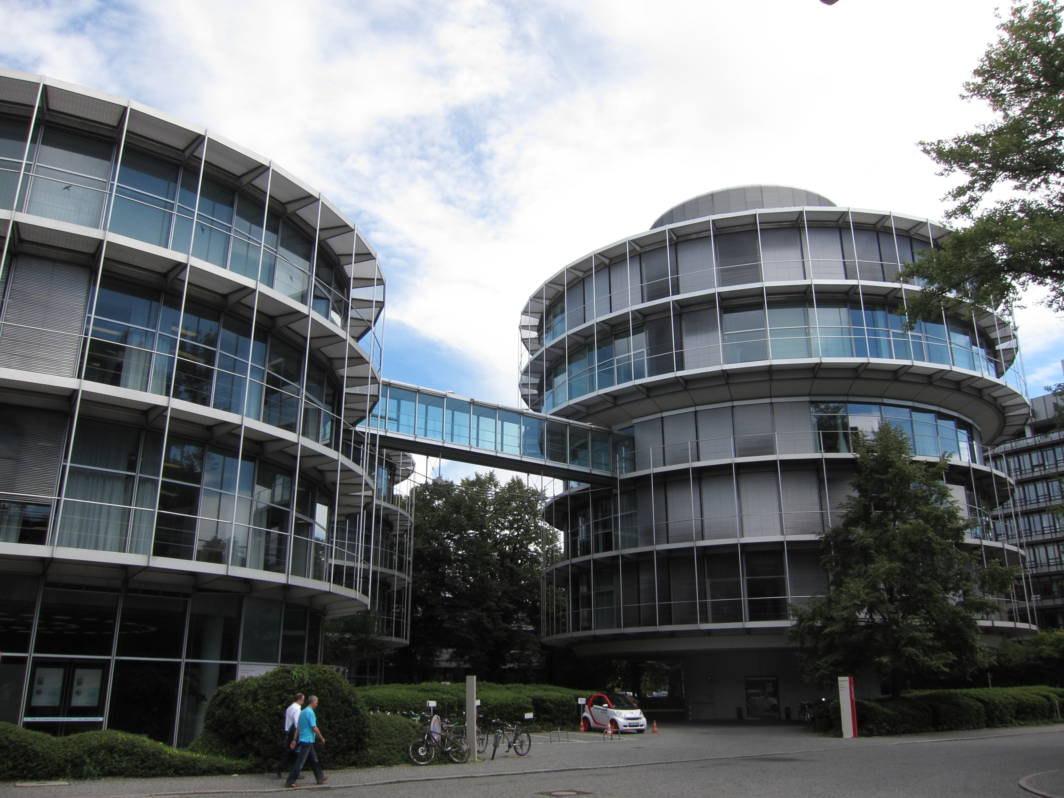 Sederanger 6, Verwaltungsgebäude der Bayerischen Rückversicherung, heute ebenfalls der HypoVereinsbank; erbaut in den Jahren 1971 - 1976 nach Entwürfen von Uwe Kiessler